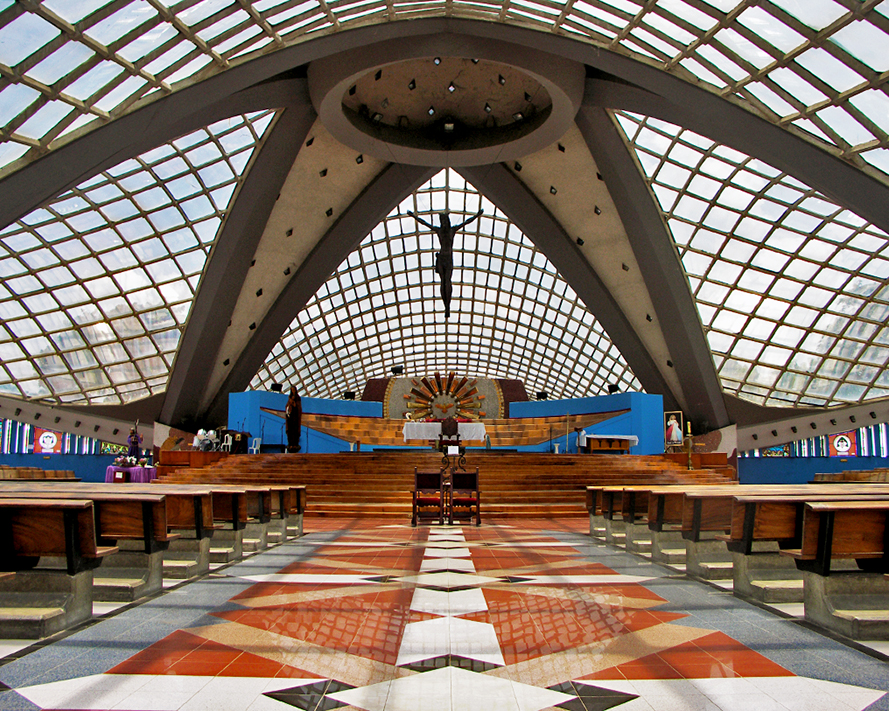 Fabulosa construcción arquitectónica de aspecto moderno que fue proyectada en los años 50 y terminada e inaugurada a finales de los años 60. Su forma es de una flor boca abajo, cuenta con fantásticos vitrales en las paredes, su techo de paneles de acrílico transparentes y como muchas otras que llaman la atención está un Cristo que diera la impresión de flotar en la parte central, se ha convertido en uno de los símbolos de peregrinación más importantes de Venezuela y del Estado Lara debido a la celebración de la Divina Pastora.